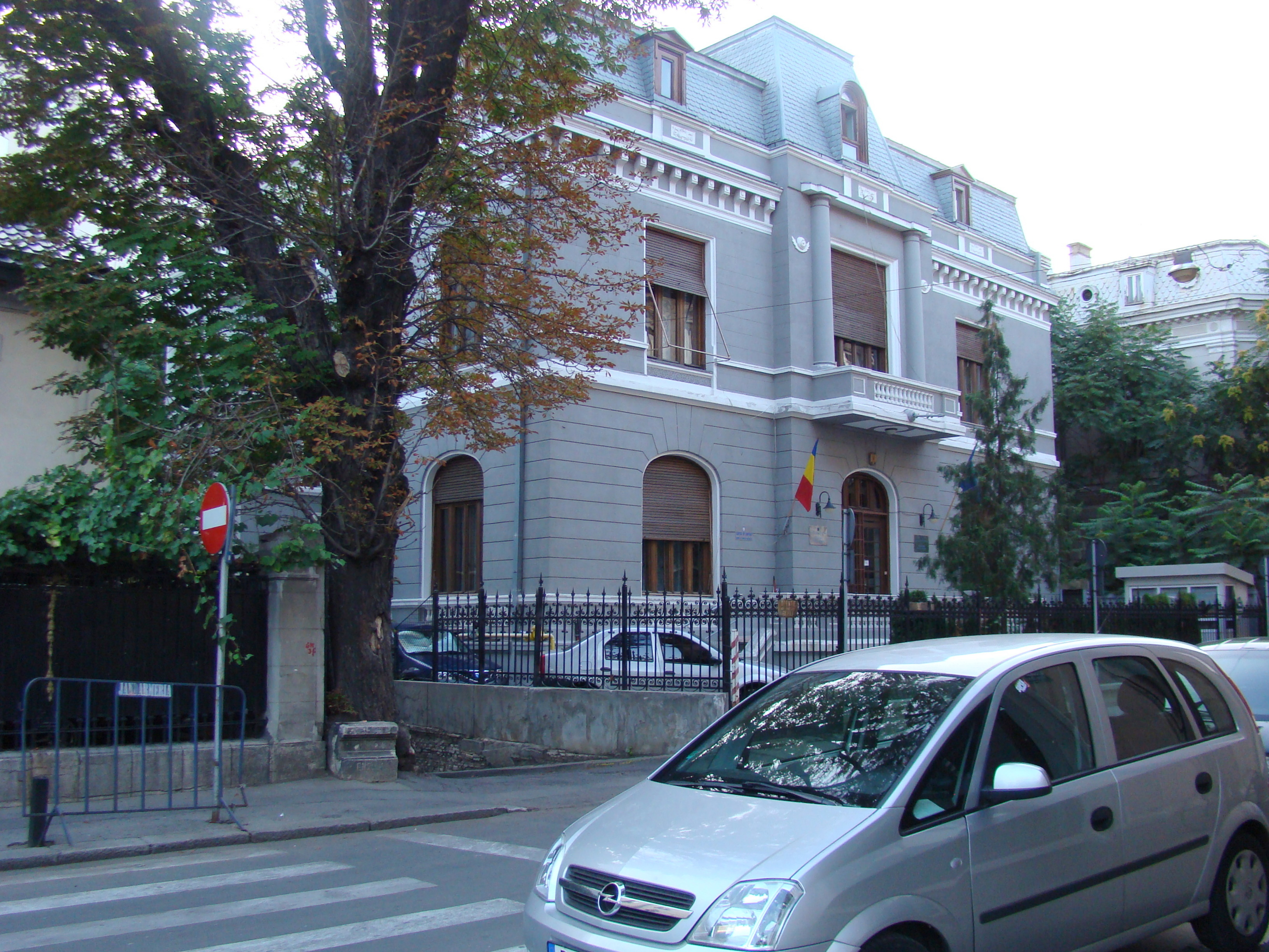 Casă monument istoric, str.Clemenceau, nr.5